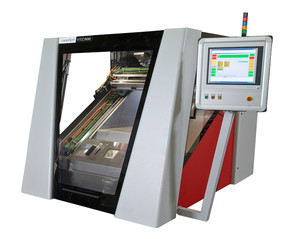 voxeljet 3D-Drucksystem VXC800